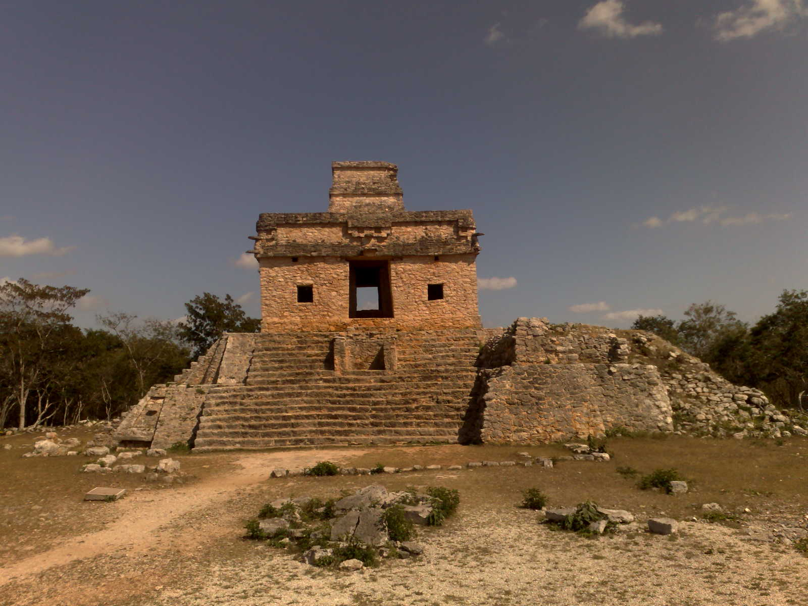 Pirámide de Dzibichaltún, desde el Sacbé